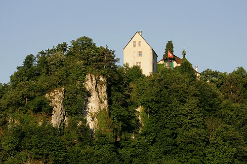 Die Burg von Burg im Leimental, Kanton Basel-Landschaft